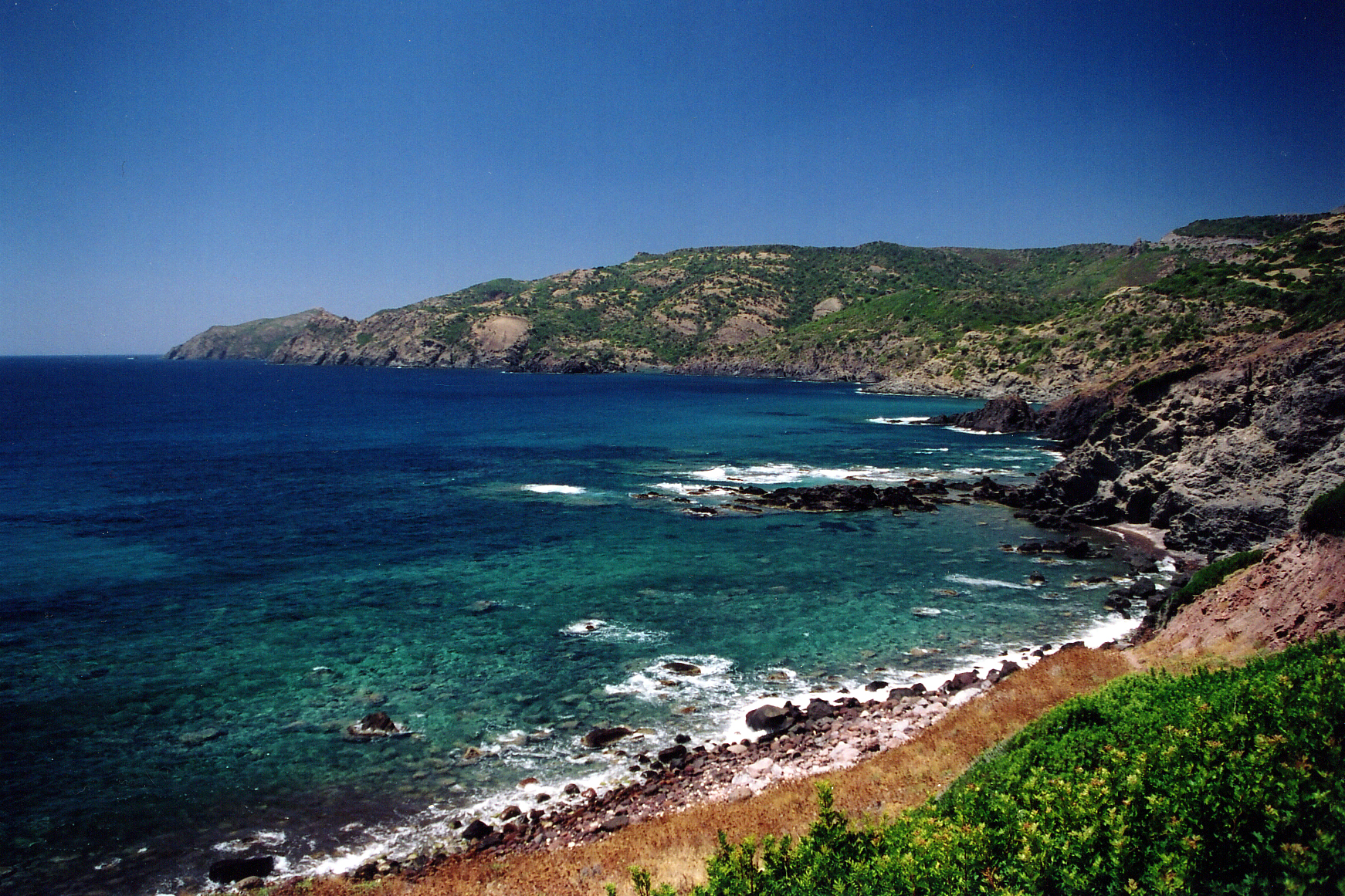 Cote ouest de la sardaigne